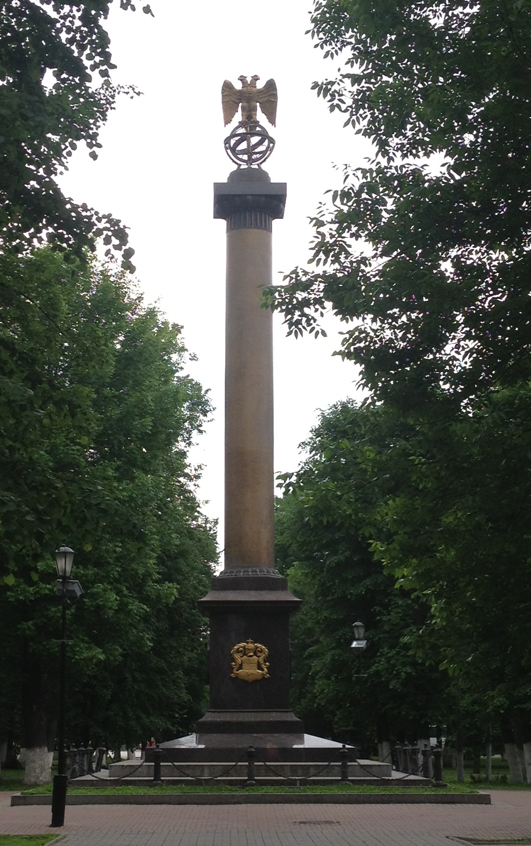 Демидовский столп в Ярославле